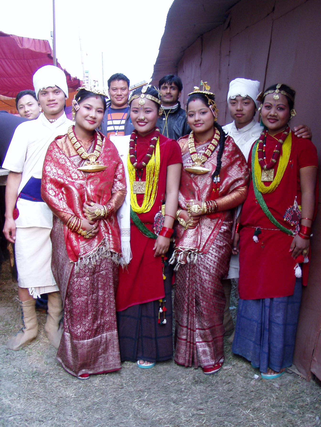 Nepali Dancers